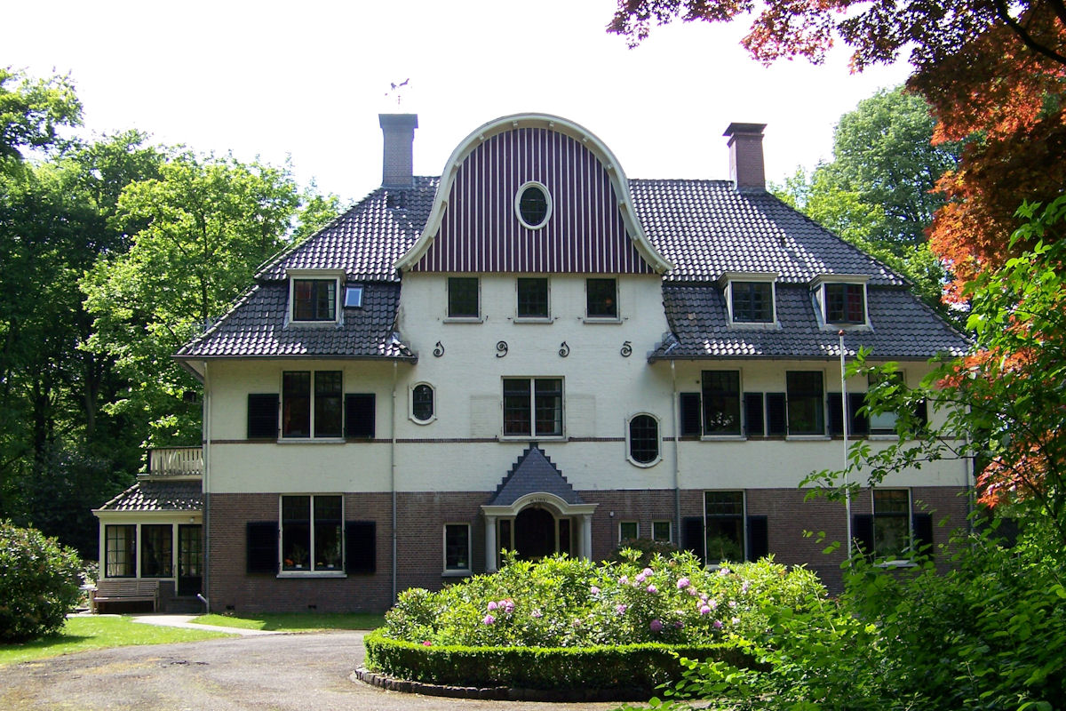 Landhuis De Lariks in Assen (1915), tegenwoordig een rijksmonument.